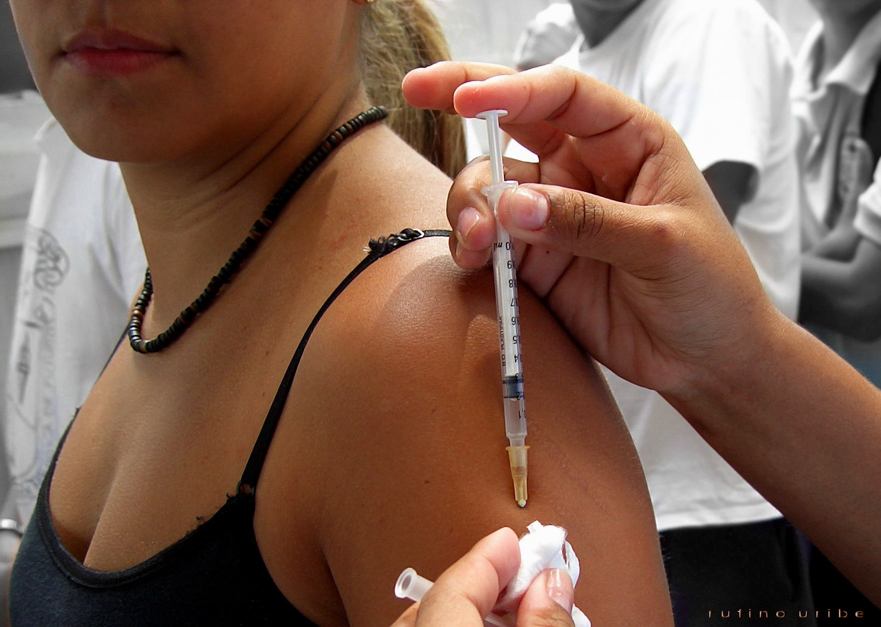 Hay personas que soportan estoicamente las inyecciones, otras que ante la simple visión de una inyectadora o de la aguja entran en pánico. ¿A cuál grupo perteneces? ...sin mentiras eh!